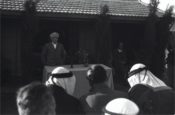 גליל ים - בחגיגת העליה לגליל ים